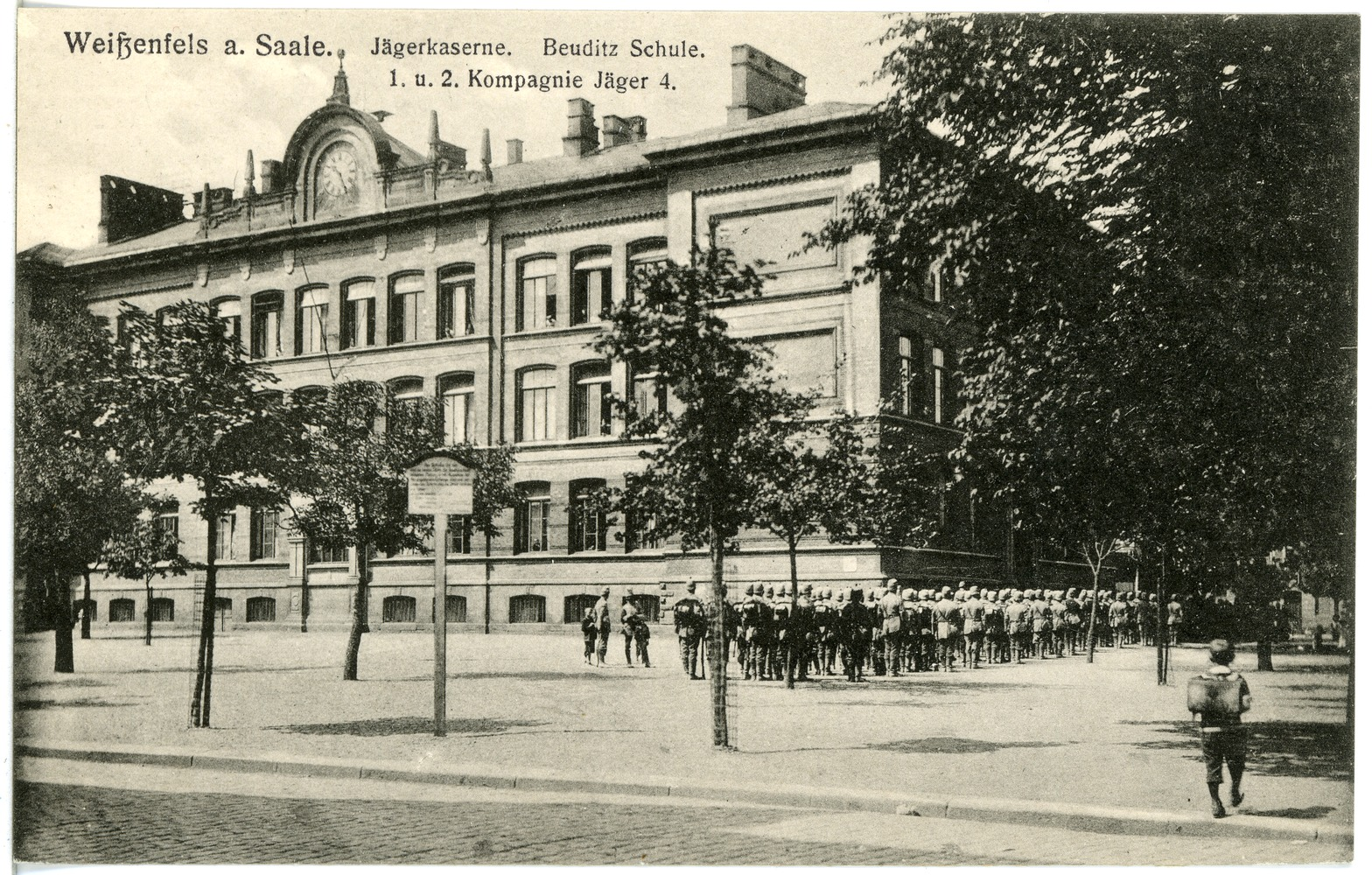 Weißenfels; Jägerkaserne - 1. und 2. Kompagnie Jäger 4. This postcard is from publisher Brück & Sohn in Meißen ( postcard has a unique number 20029 and is available in a higher resolution at the publisher. This images was uploaded in a cooperation project between Wikipedians and the publisher.